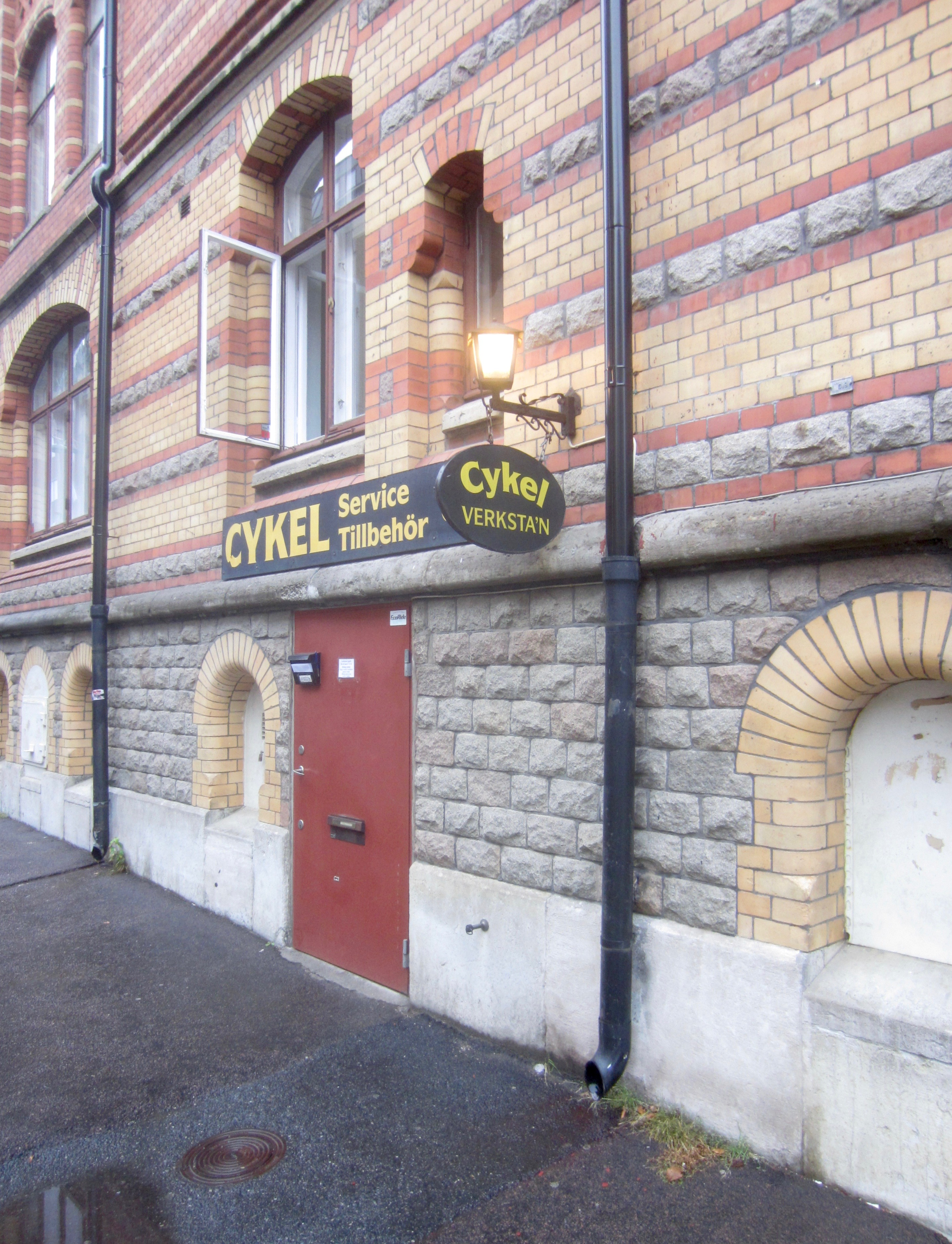 Cykelverkstad på Sveagatan 10 i Göteborg.